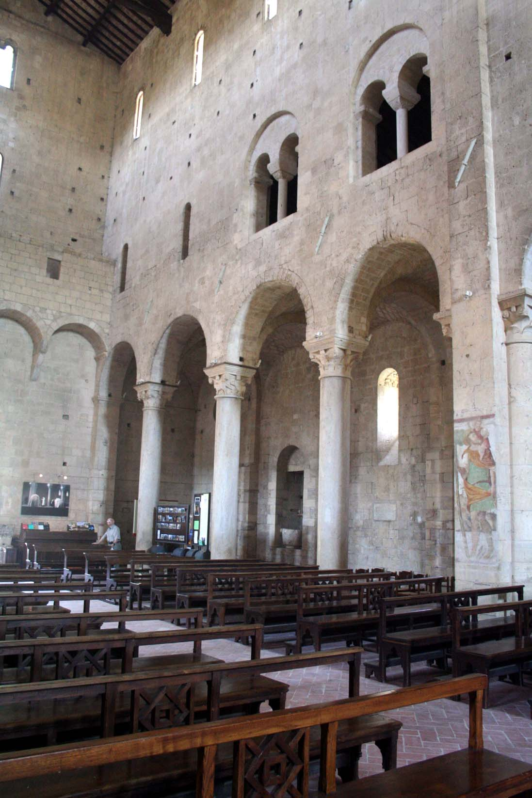 Sant Antimo: Innenraum